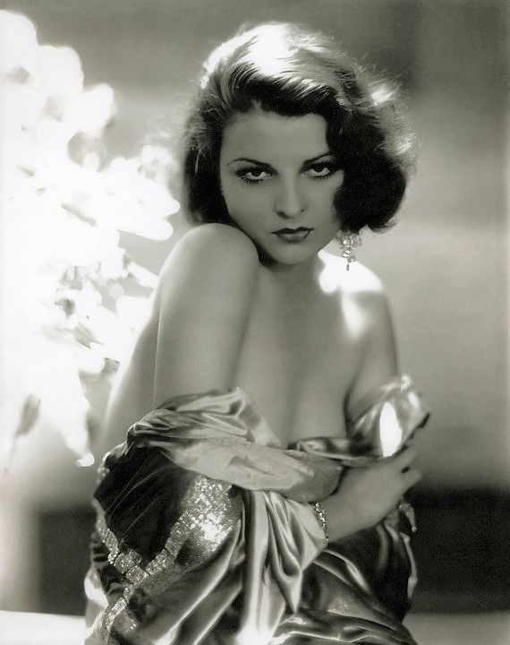 Lilian Bond